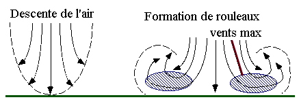 Descente de l'air sous un orage donnant une rafale violente connue comme macro ou micro-rafale.